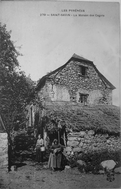 Maisons de cagots dans le quartier Mailhòc (maillet de bois), Saint-Savins, Carte postale ancienne (1906). Cette maison aurait été démolie